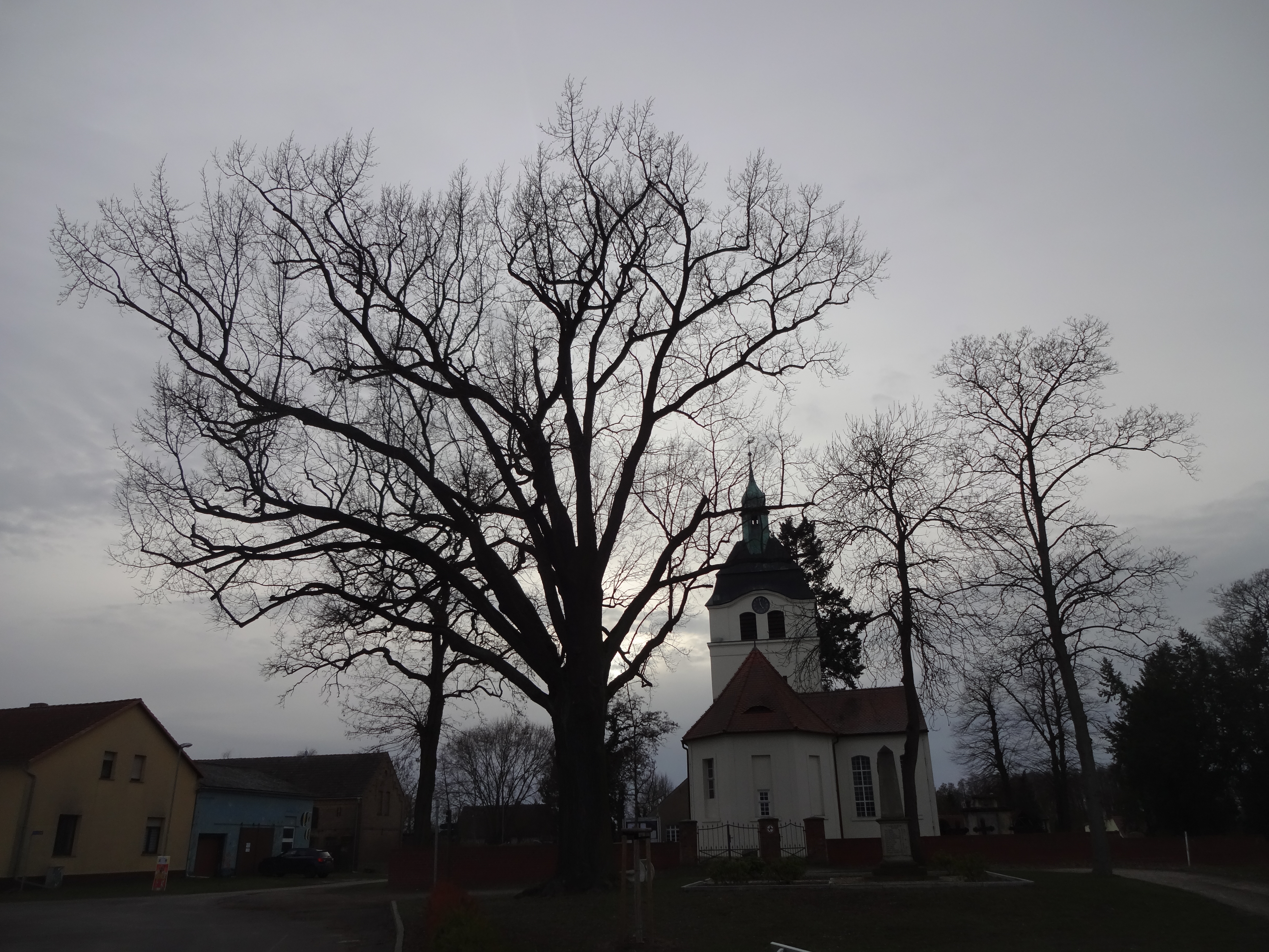 als Naturdenkmal geschützte Friedens-Eiche in Jeserig (Groß Kreutz)